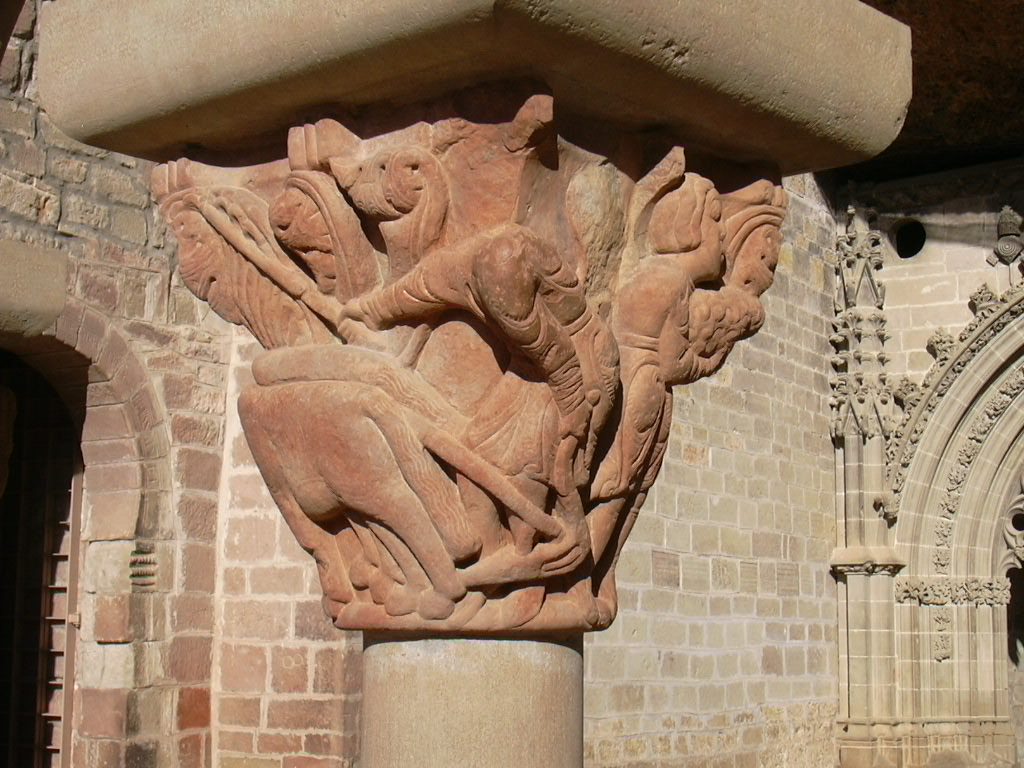 Monasterio de San Juan de la Peña en la provincia de Huesca (España)